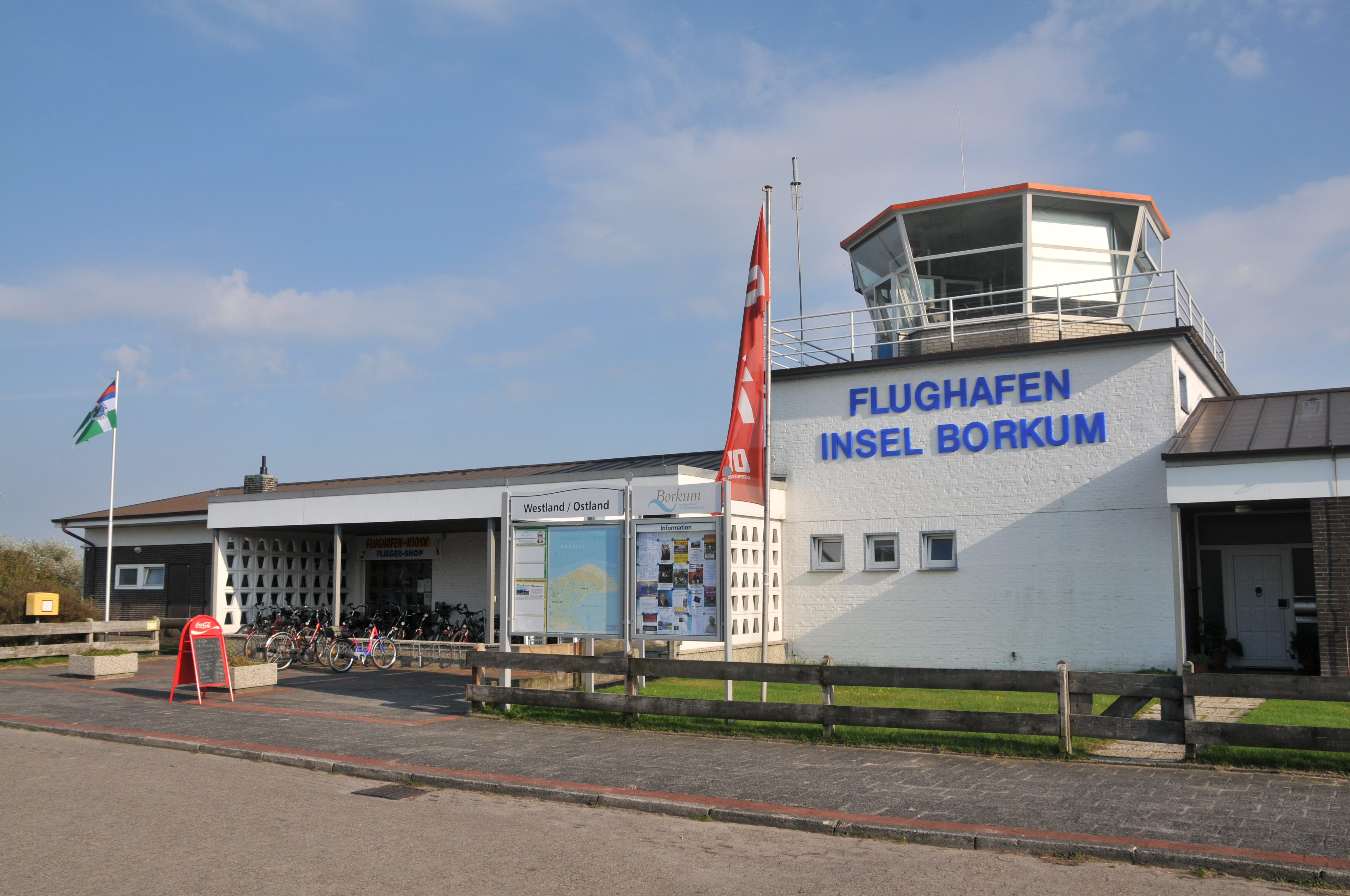 Fotoflug Nordsee